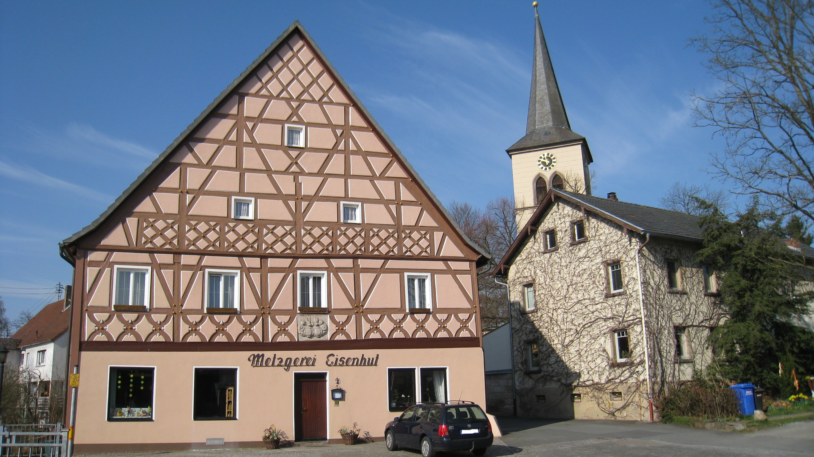 Haus Eisenhut, Schwarzach